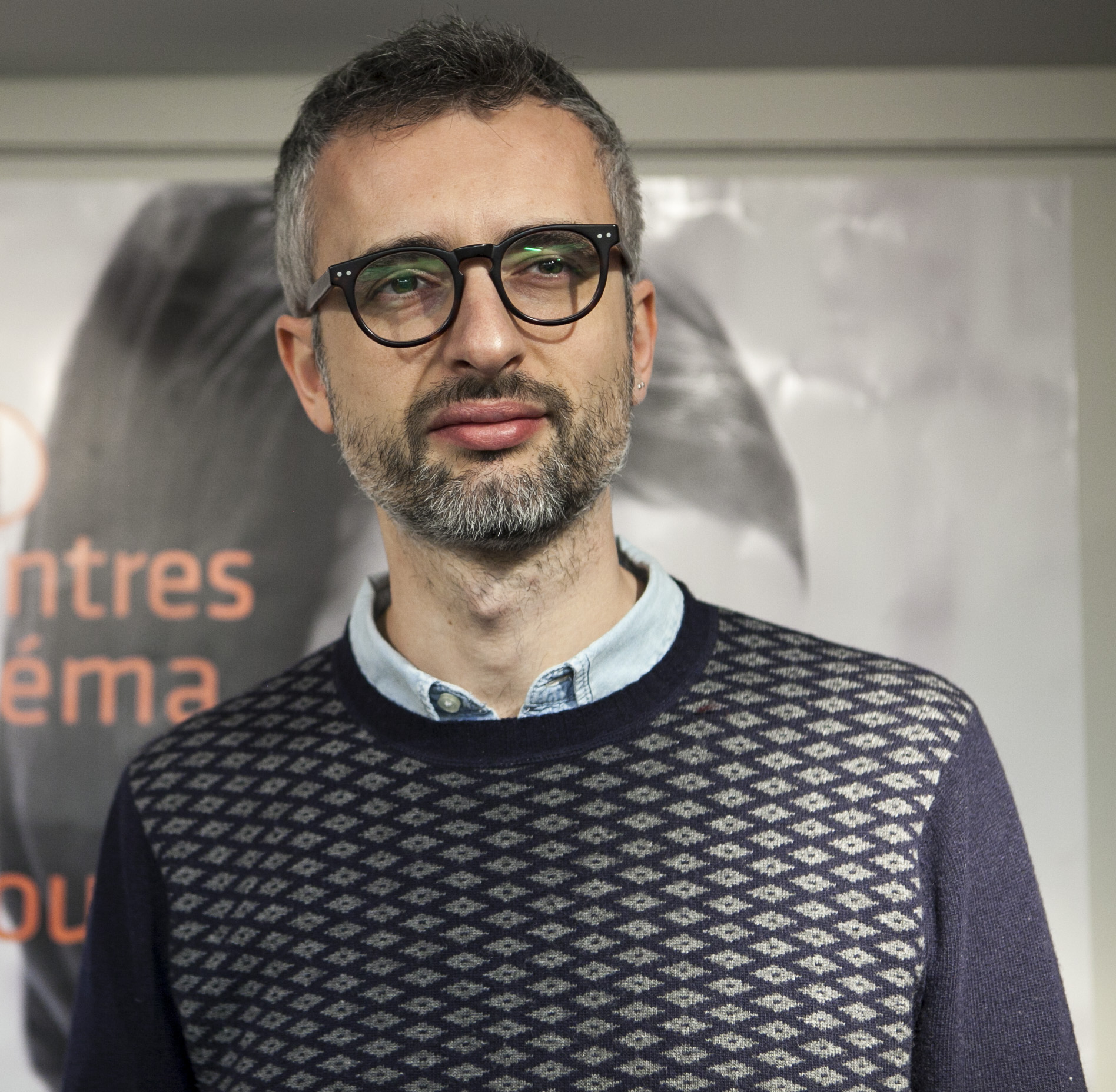 Marco Danieli - réalisateur de La ragazza del mondo